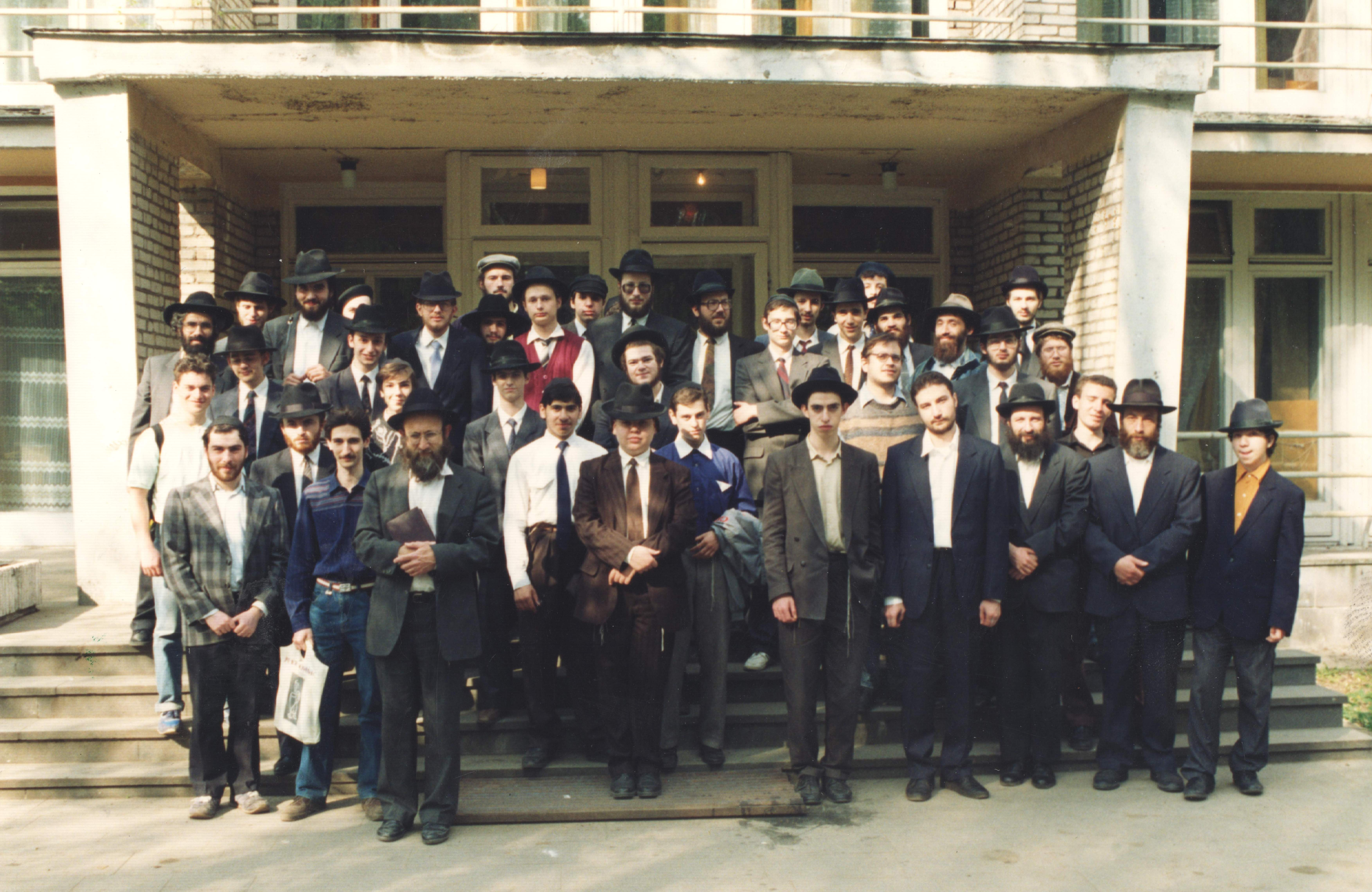 students at torat haim yeshiva at moscow